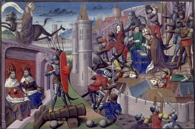 Martyre de St Didier de Langres (Speculum historiale, XIV. siècle)